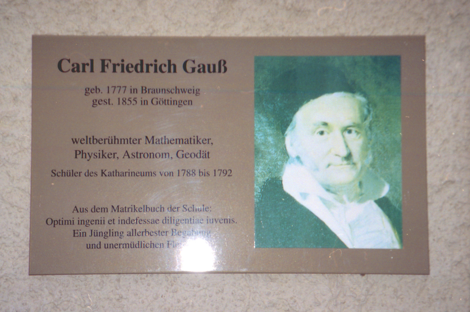 Памятная доска на школе, в которой учился Гаусс